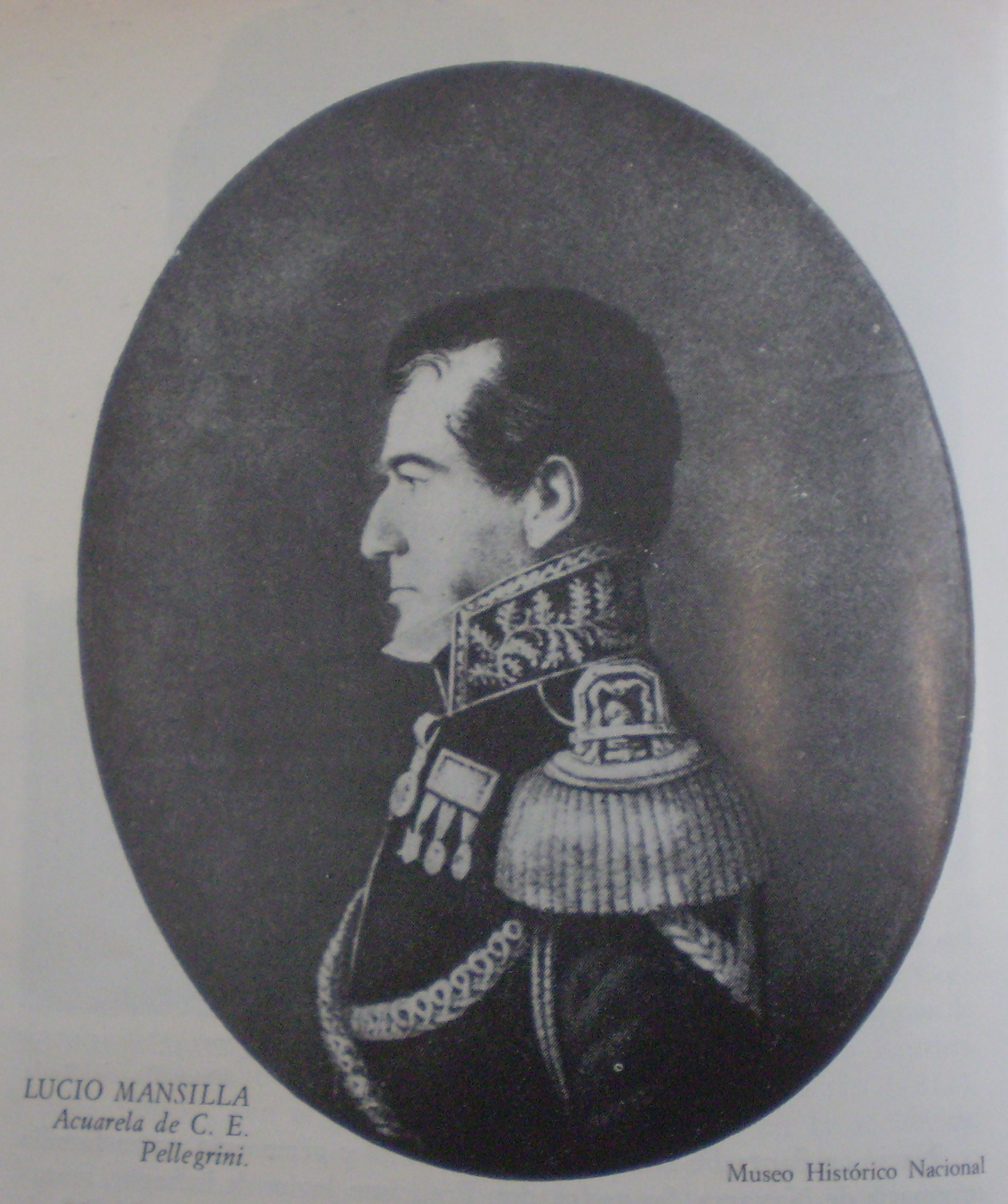 Lucio N. Mansilla. Acuarela de Carlos Pellegrini. original en el Museo Histórico Nacional.